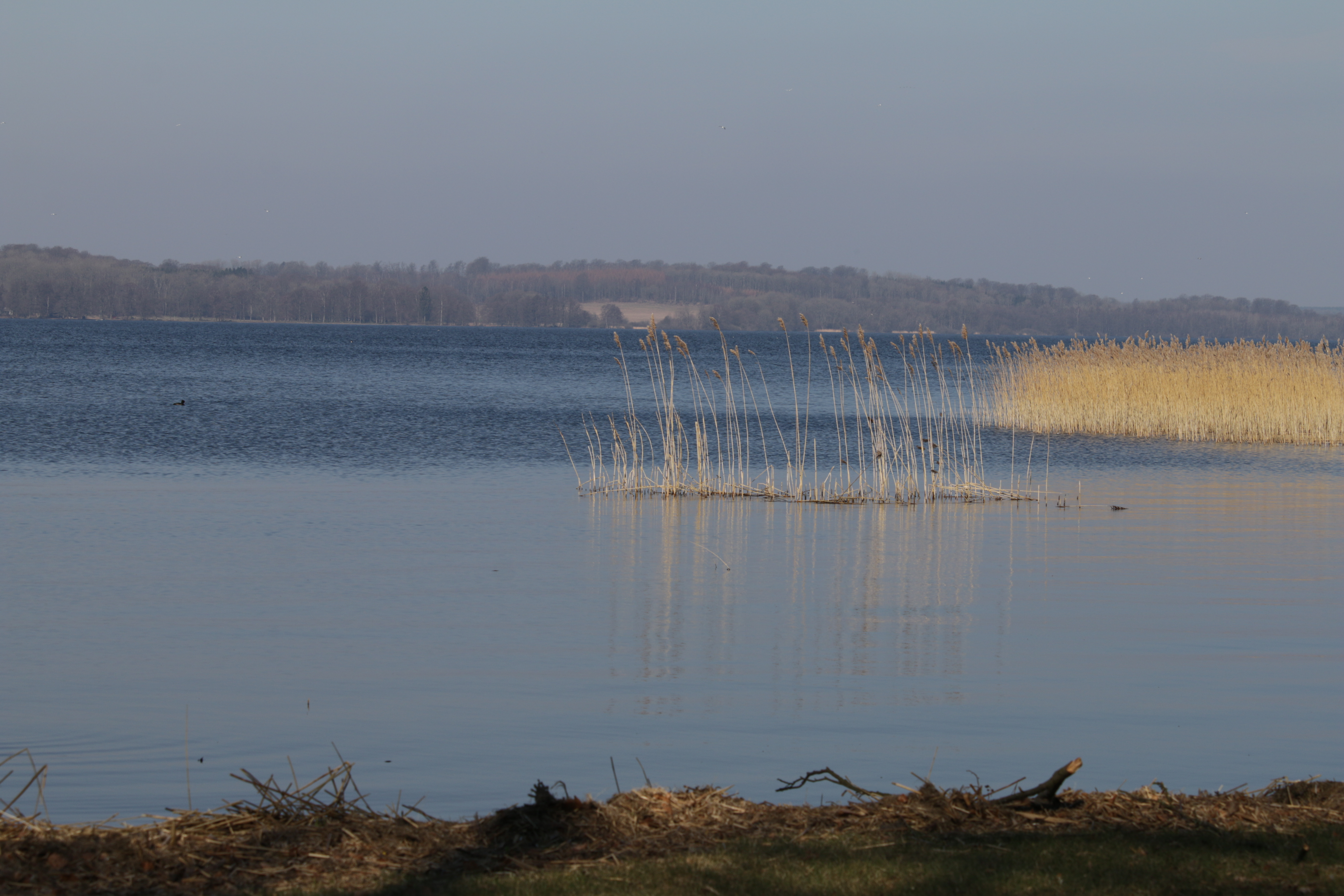 Västra Ringsjön april 2018